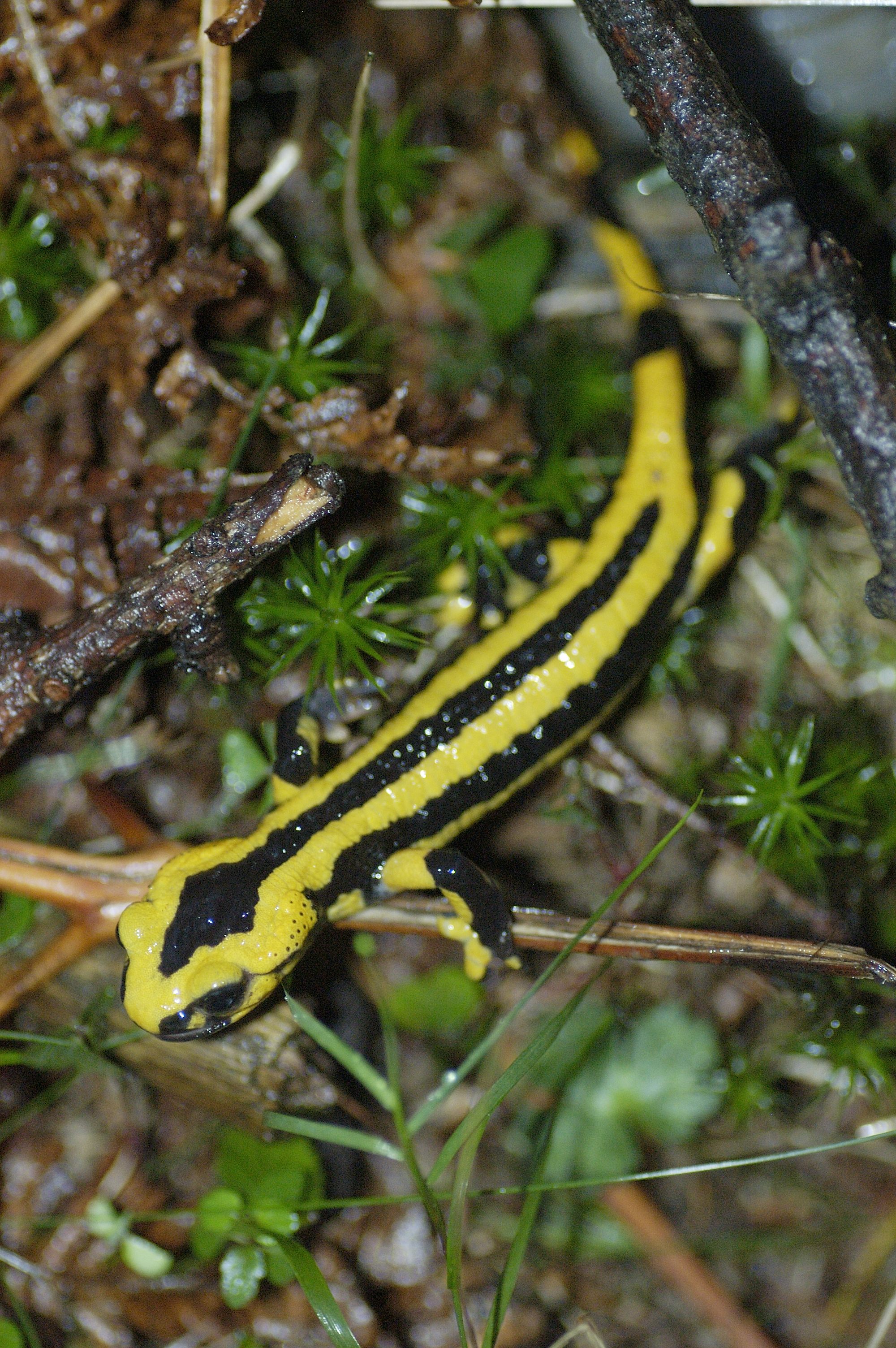 Salamandra Salamander